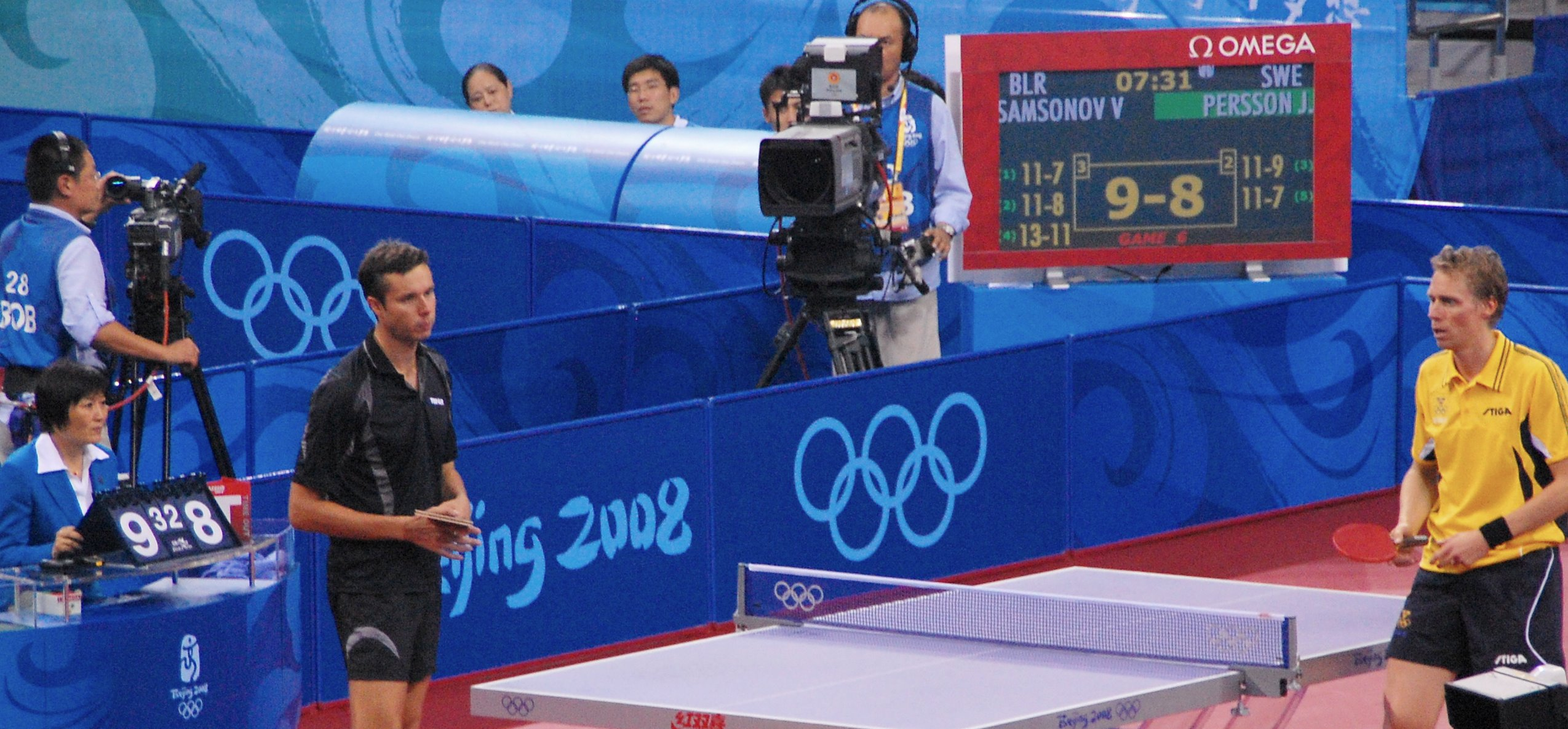 Vladimir Viktorovich Samsonov (black) v. Jörgen Persson (yellow)